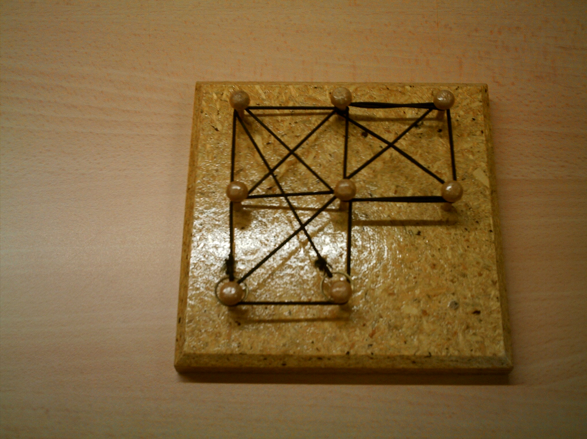 geoplanoa